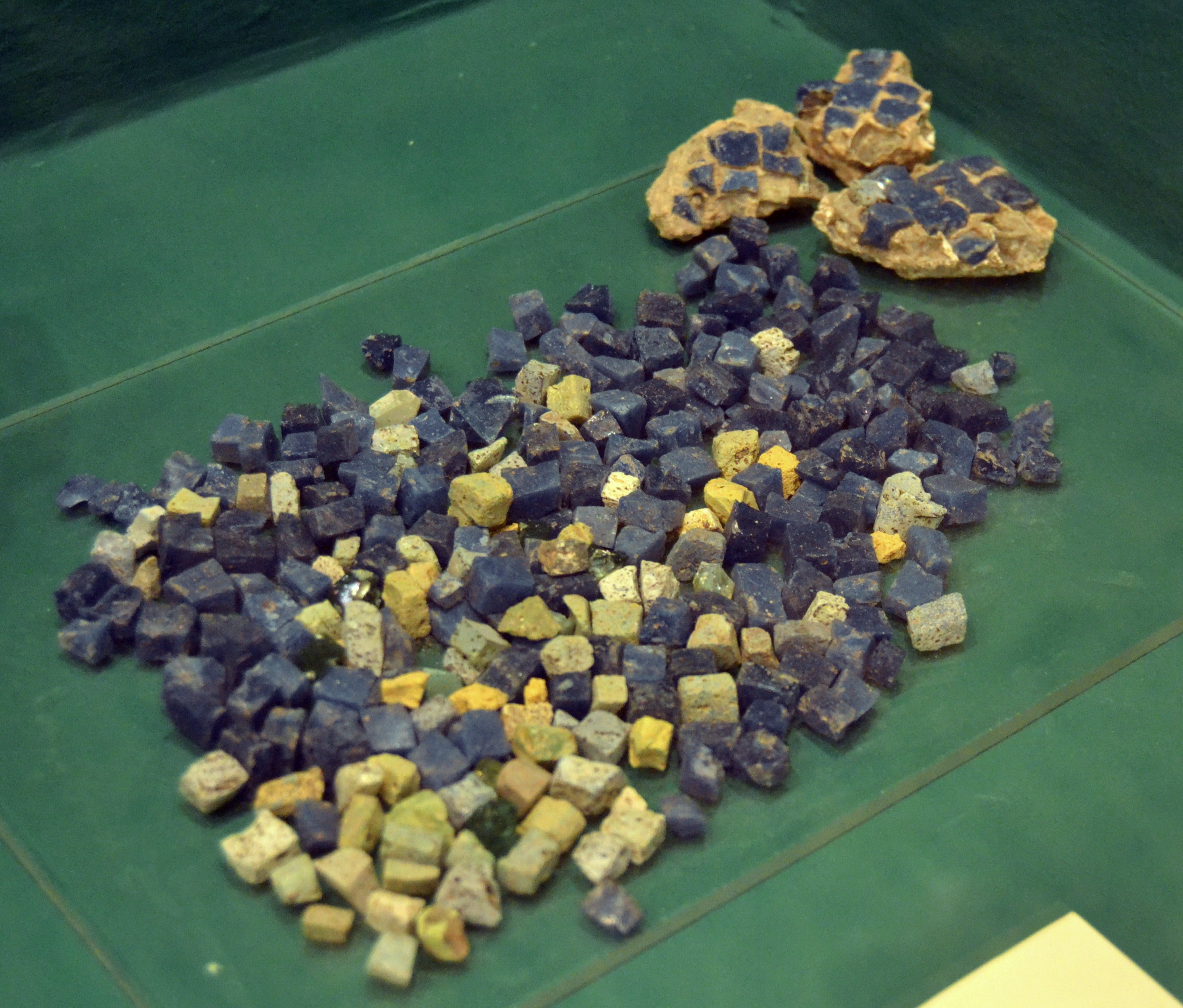 Tessel·les de vidre de mosaic, segles I - III dC, vil·la Cornelius de l'Ènova.